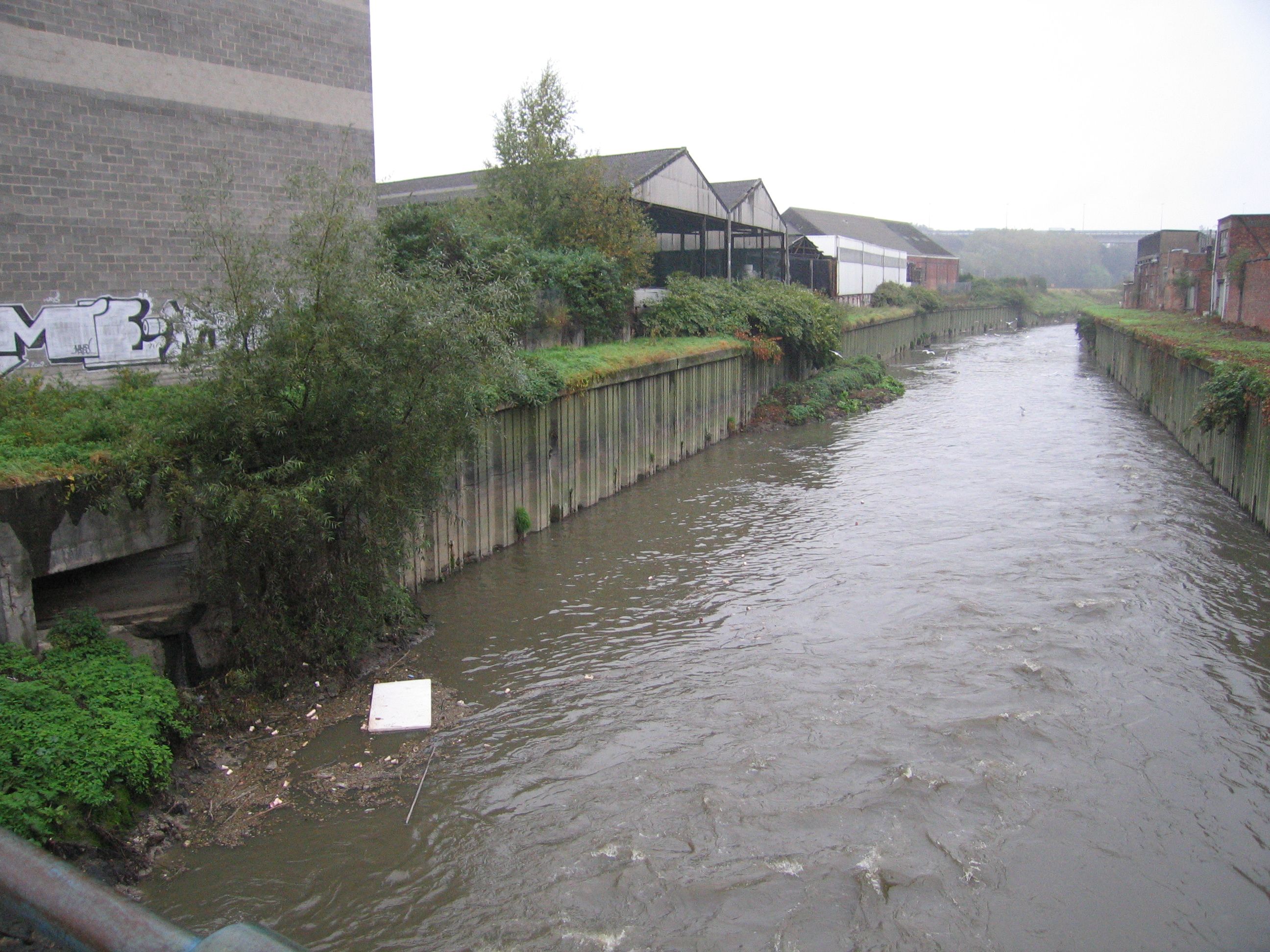 Eigen foto 2005-10-22